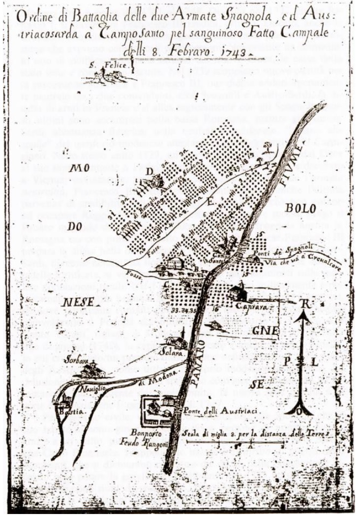 Ordine di Battaglia delle due Armate Spagnola ed Austriacosarda a Camposanto pel sanguinoso Fatto Campale delli 8 Febraro 1743 (Archivio Storico del Comune di Modena, cassetta "cose varie" n. 7, posizione 66)